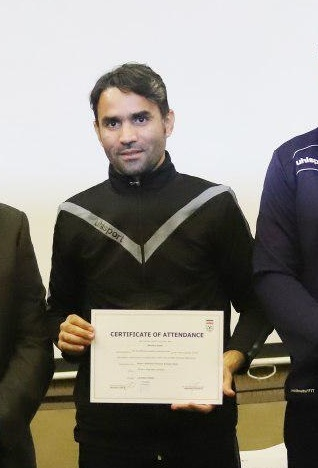 تصاویر مرحله دوم کلاس مربیگری B آسیا در تهران به مدرسی امیر حسین پیروانی با حضور ستارگان سابق فوتبال مثل تیموریان، جباری، حیدری،‌عمران‌زاده، بیک‌زاده و بنگر